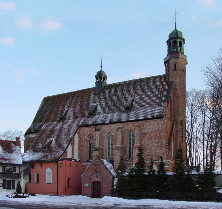 Żukowo - kościół SS. Norbertanek (XIII-XIV w.).